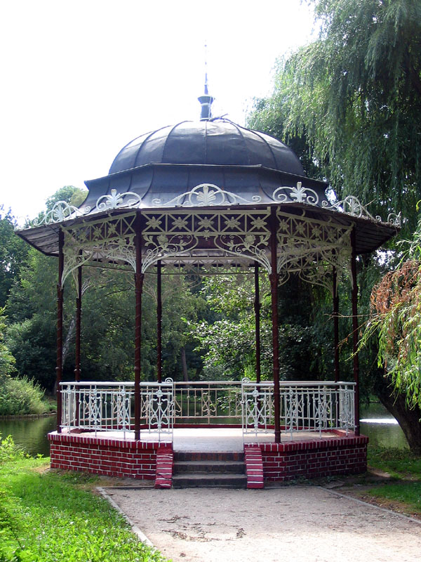 Altana z 1904 r. w Parku Miejskim w Pile